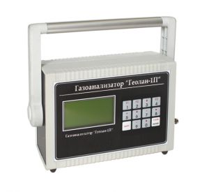 Переносной газоанализатор